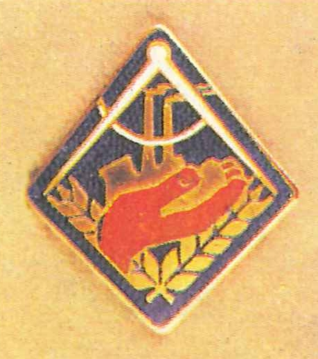 Jungaktivistenabzeichen der FDJ 1. Form 1949-1952